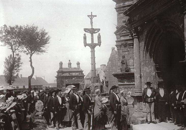 Commana (Finistère, France) : arrivée d'un mariage à l'église.